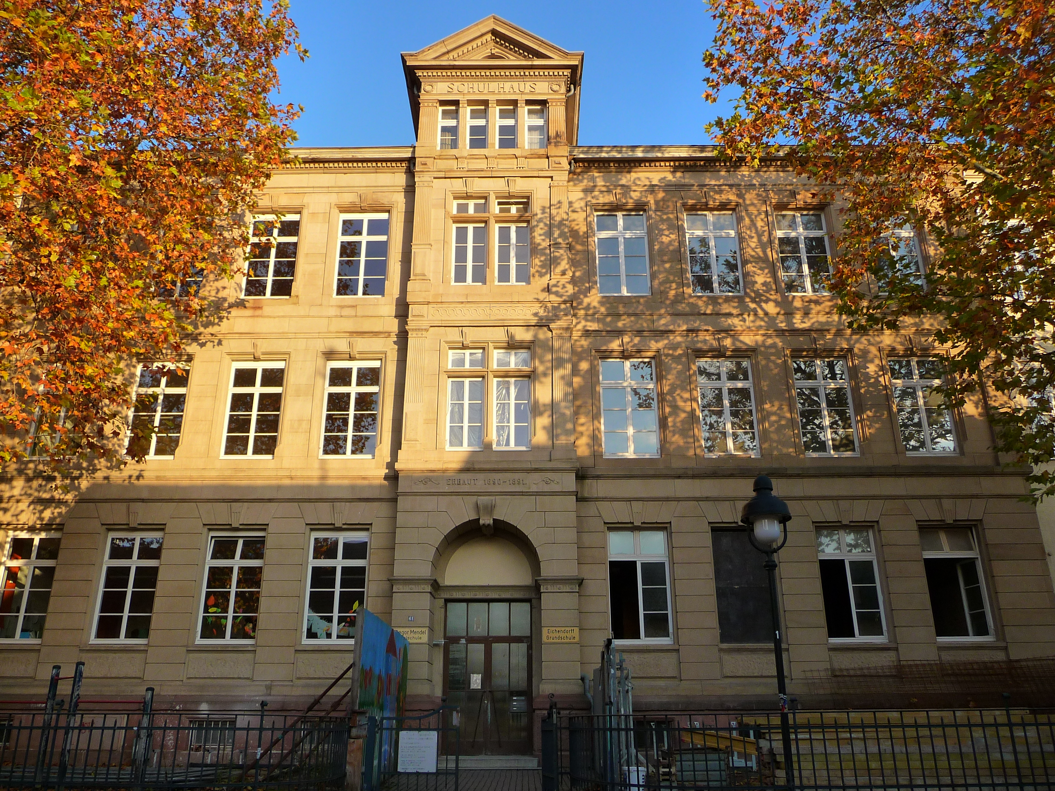 Haupteingang der Eichendorff-Grundschule und Gregor-Mendel-Realschule im Heidelberger Stadtteil Rohrbach, erbaut 1890/1891, An- und Umbau 2009